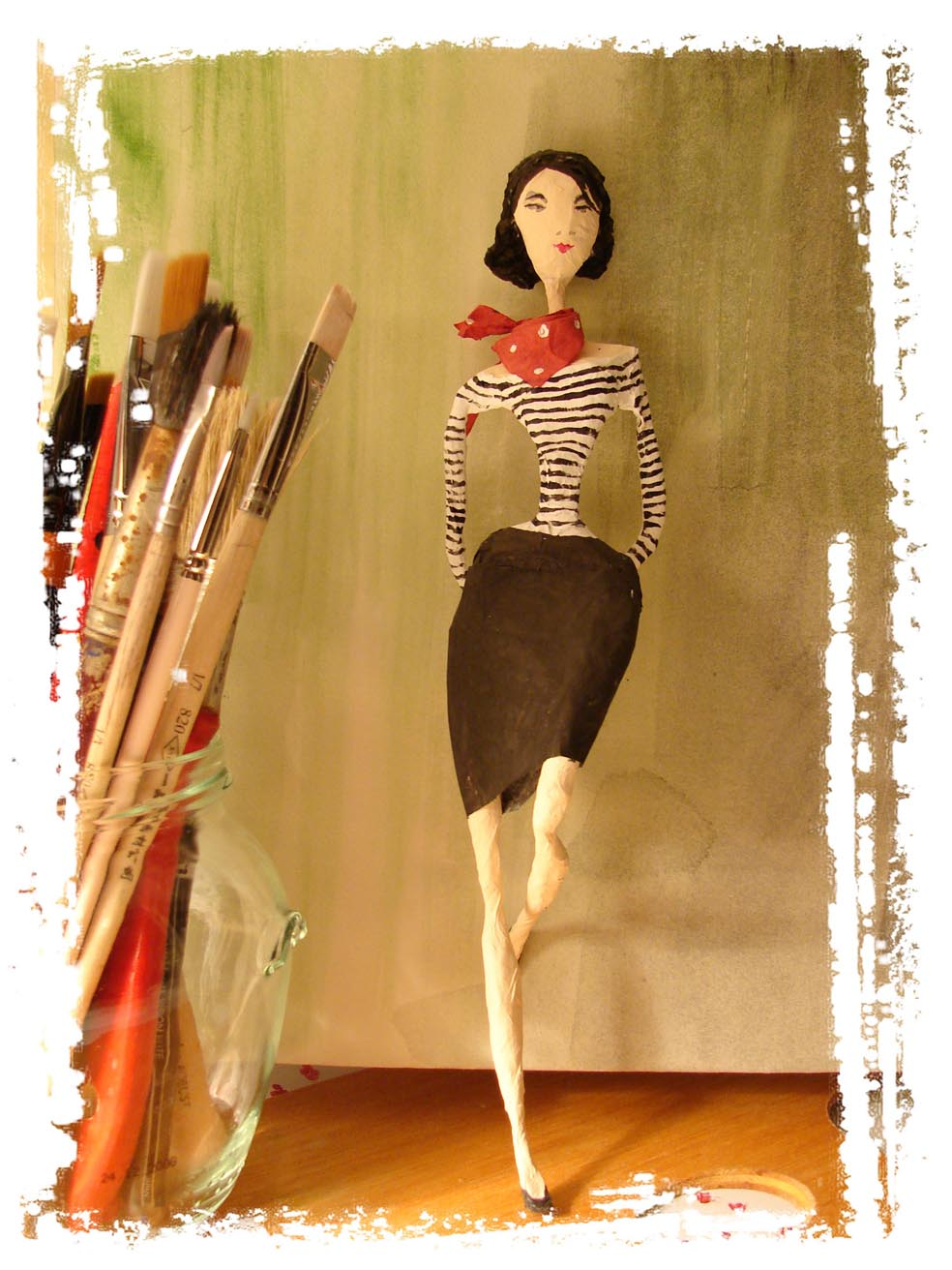 figura od papir-machea, Tatjana Novakovic,autorski rad